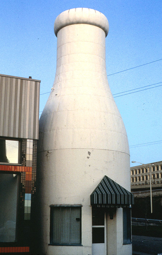 Building shaped like milk bottle